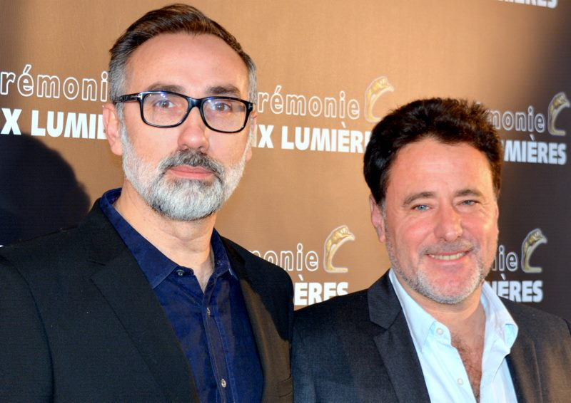 Guy Laurent et Philippe de Chauveron à la cérémonie des prix Lumières